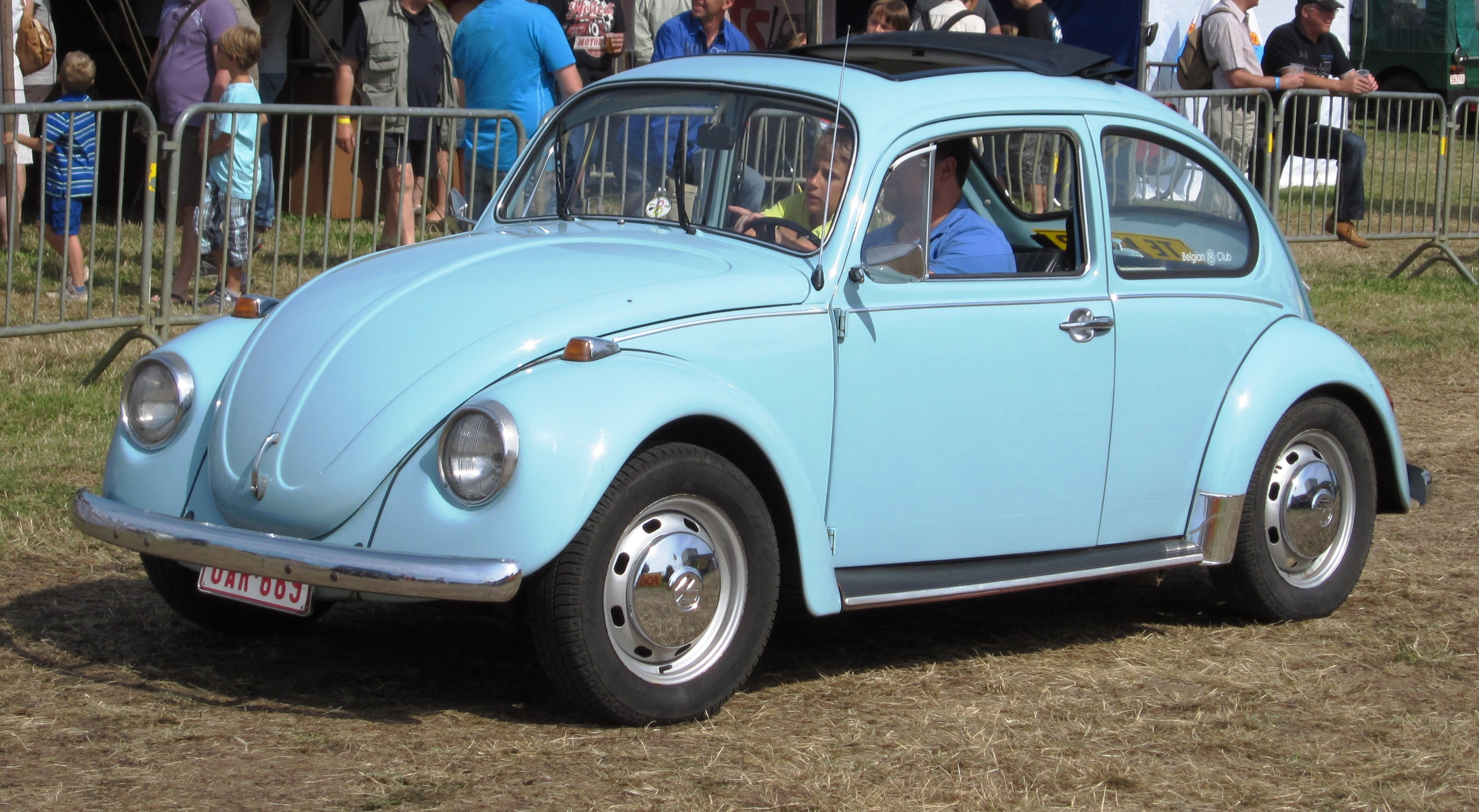 VW Cocinelle d'annees 60